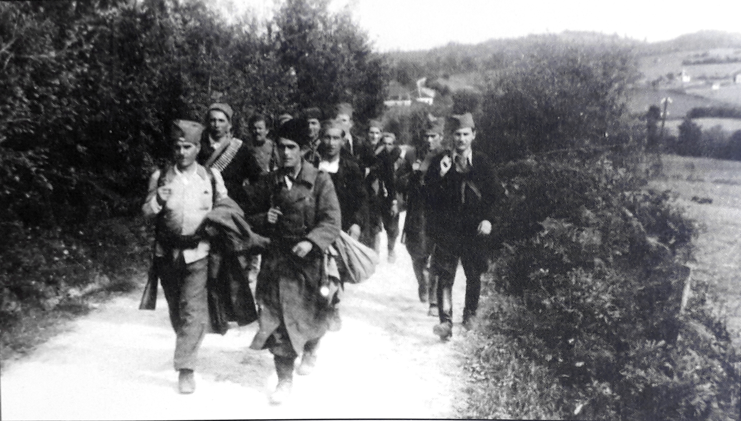 Srpskohrvatski / српскохрватски: Borci Valjevskog partizanskog odreda u jesen 1941.